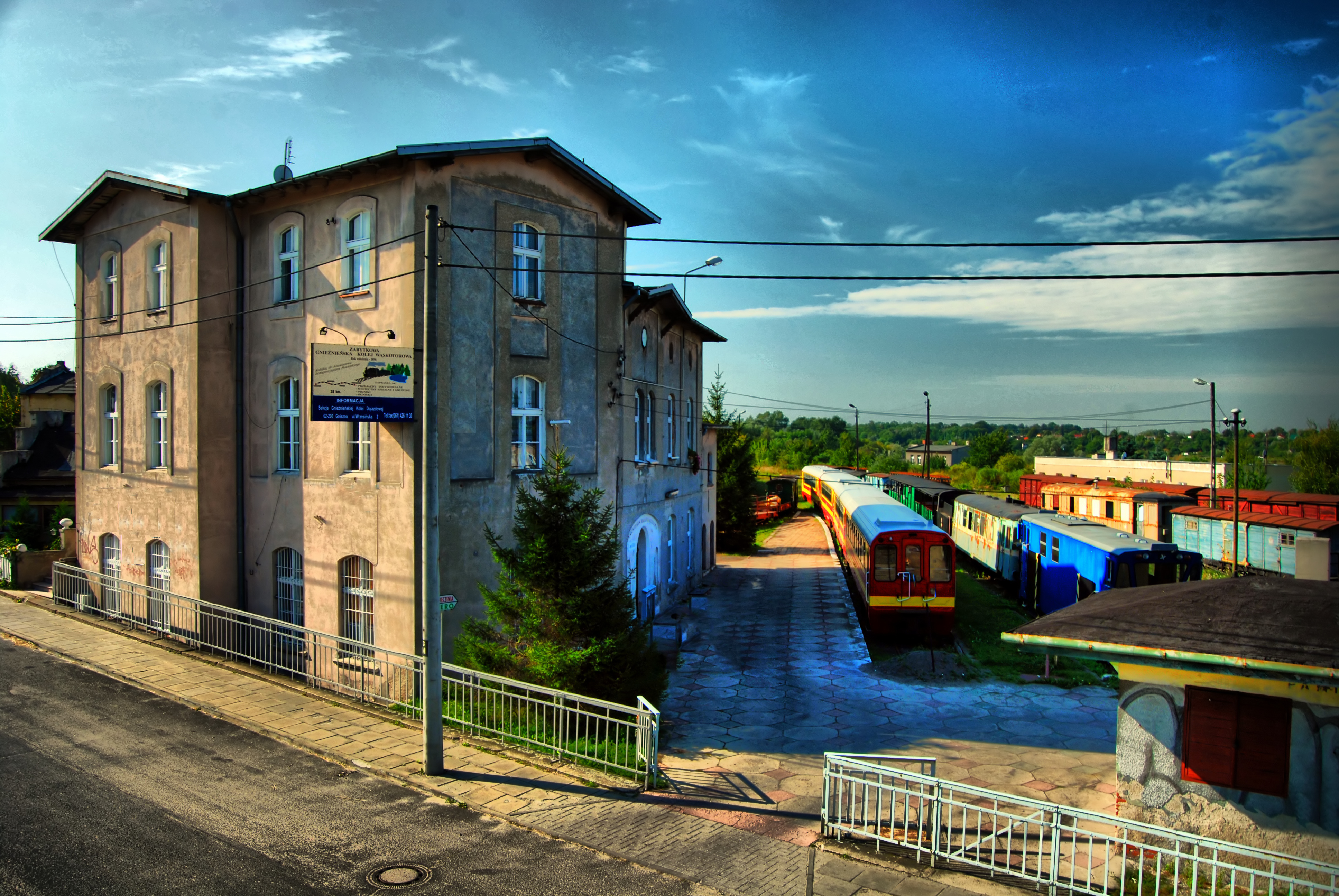 Stacja kolei waskotorowej w Gnieźnie.